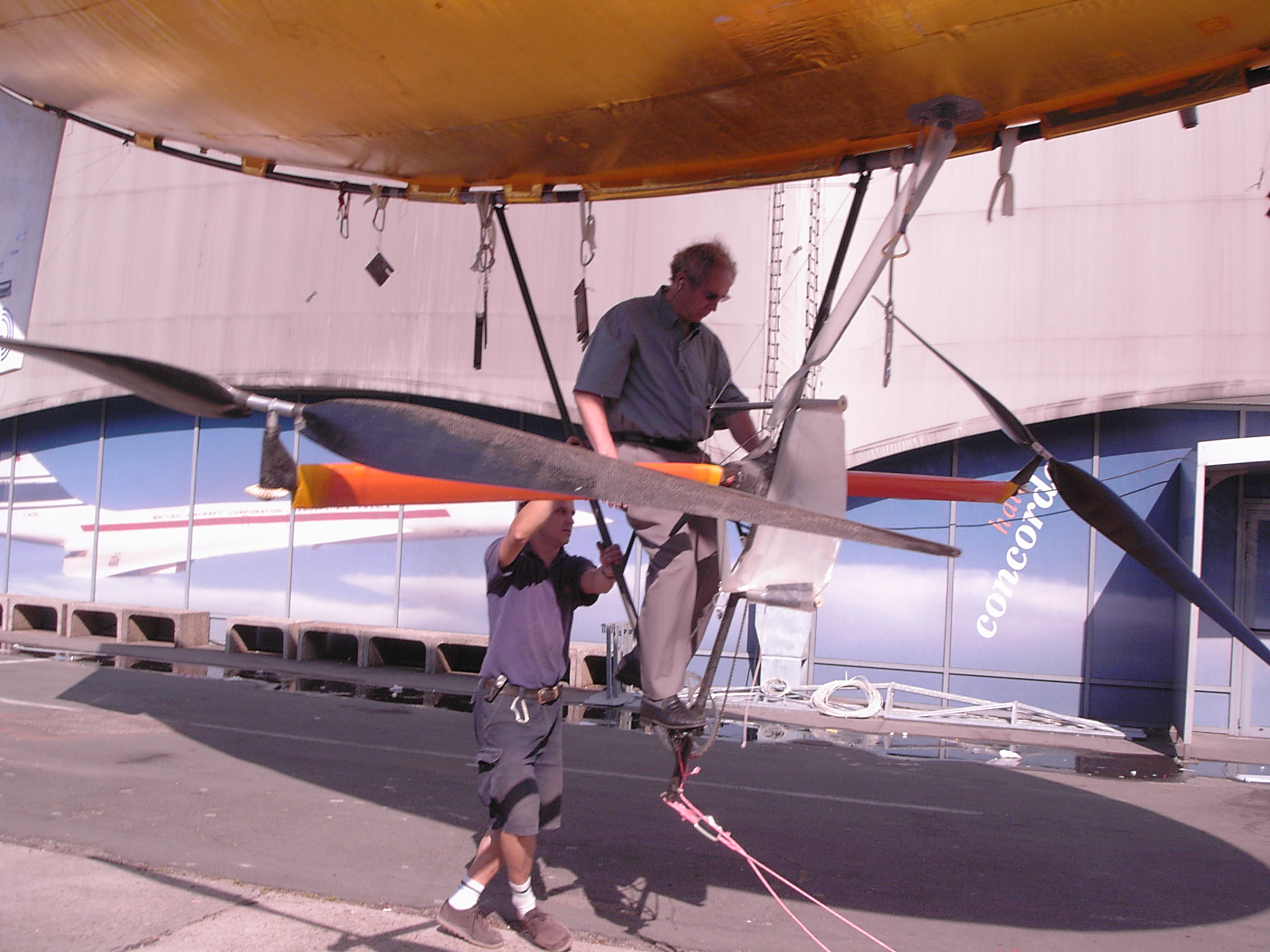 Zeppy en restauration au Musée de l'air et de l'espace du Bourget